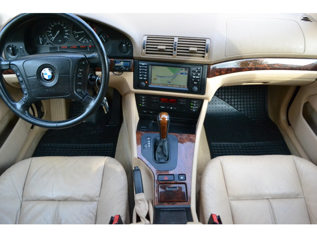 BMW 525d E39 Touring